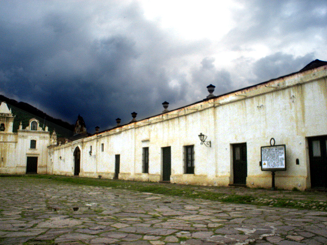 Convento de San Bernardo